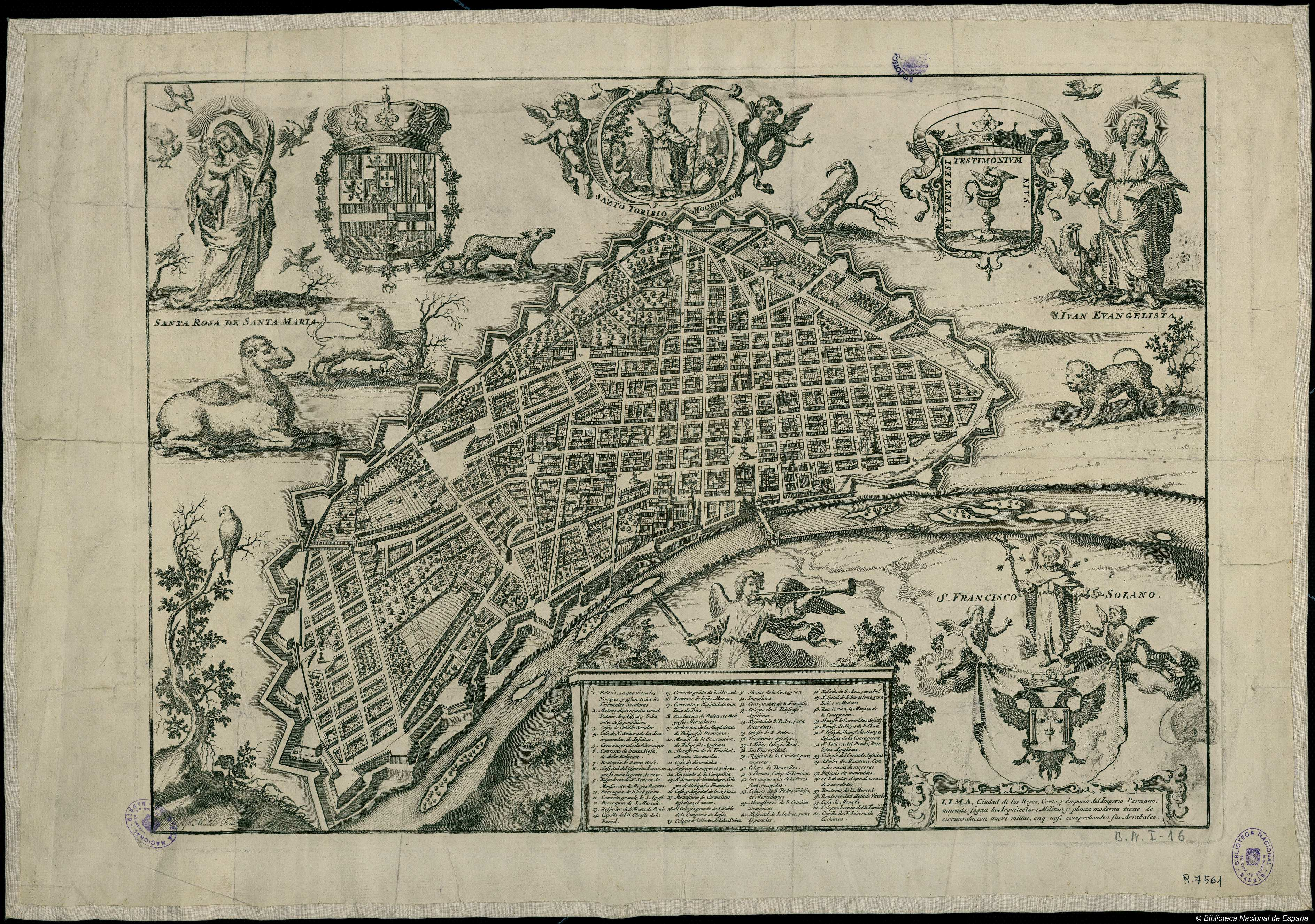 Plano de Lima. Grabado de Joseph Mulder. Inscripción: "Lima, Ciudad de los Reyes, Corte y Emporio del Imperio Peruano, murada según la Arquitectura Militar y planta moderna tiene de circunvalacion nueve millas, enq nose comprehenden sus Arrabales". Biblioteca Nacional de España. Ilustración de "La estrella de Lima convertida en sol sobre sus tres coronas. El B. Toribio Alfonso de Mogrovexo, su segundo arzobispo. Celebrado con epitalamios... Descripción sacro política de las grandezas de la ciudad de Lima... que describe D. Francisco de Echave y Assu, Amberes por Juan Baptista Verdussen, 1688, hoja de lámina plegada entre las páginas 196 y 197.